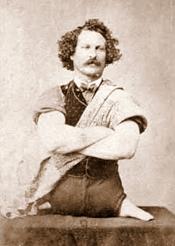 Eli Bowen, age 23